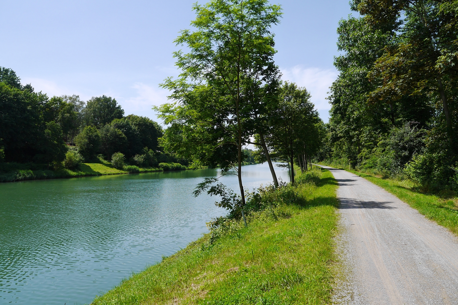 Wesel-Datteln-Kanal bei Schermbeck